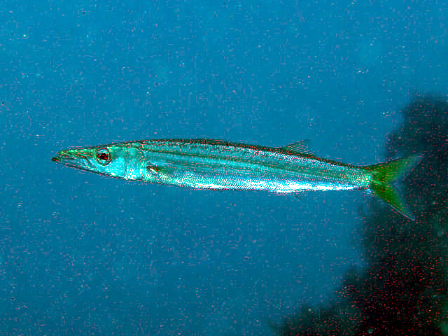 ヤマトカマス Sphyraena japonica